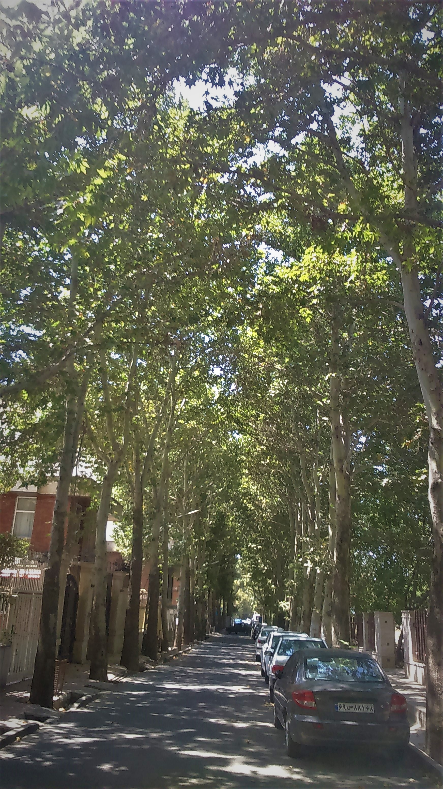 باغهای جهانشهر